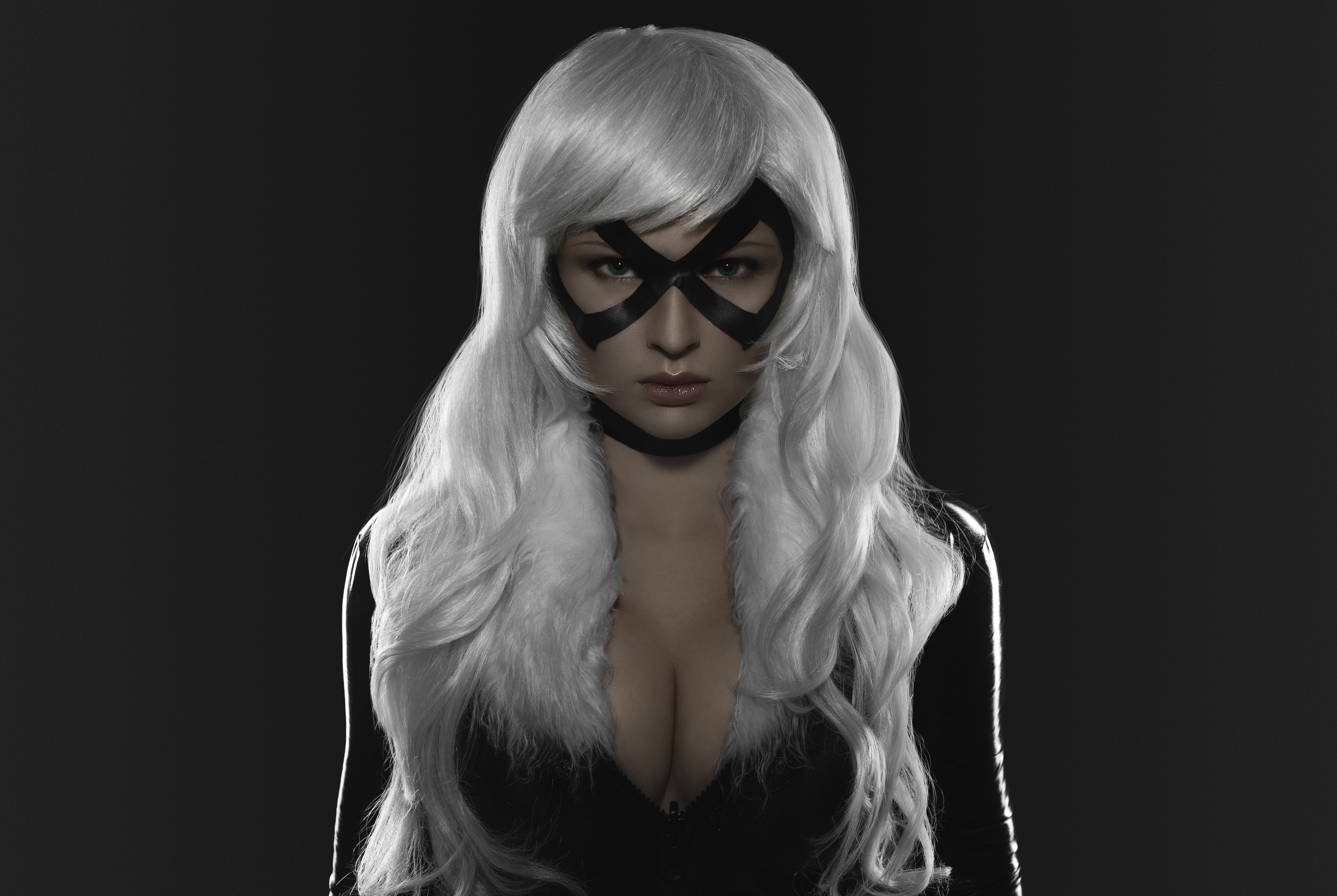 Marvel's Black Cat (cosplay)